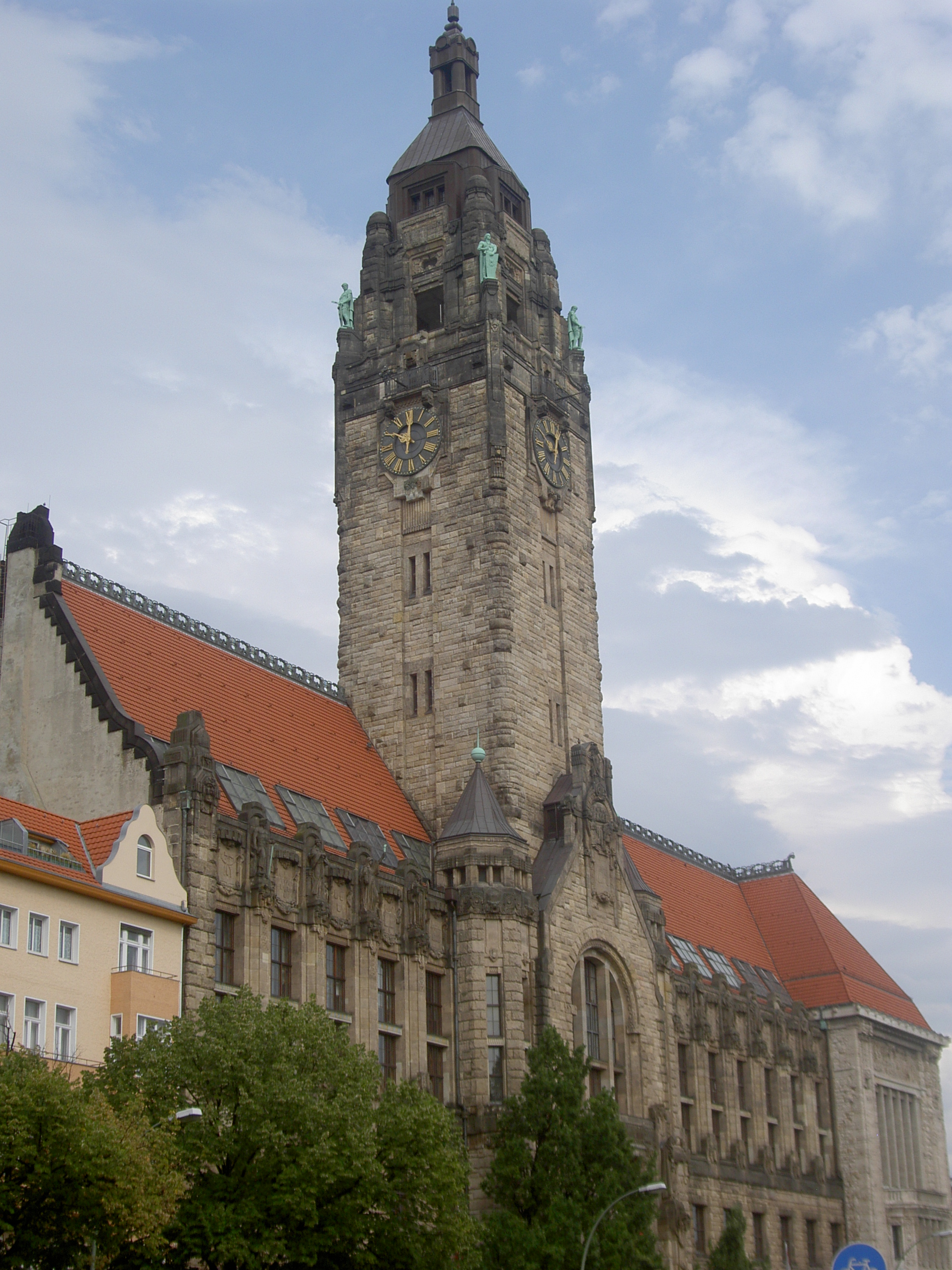 Mairie de Charlottenburg